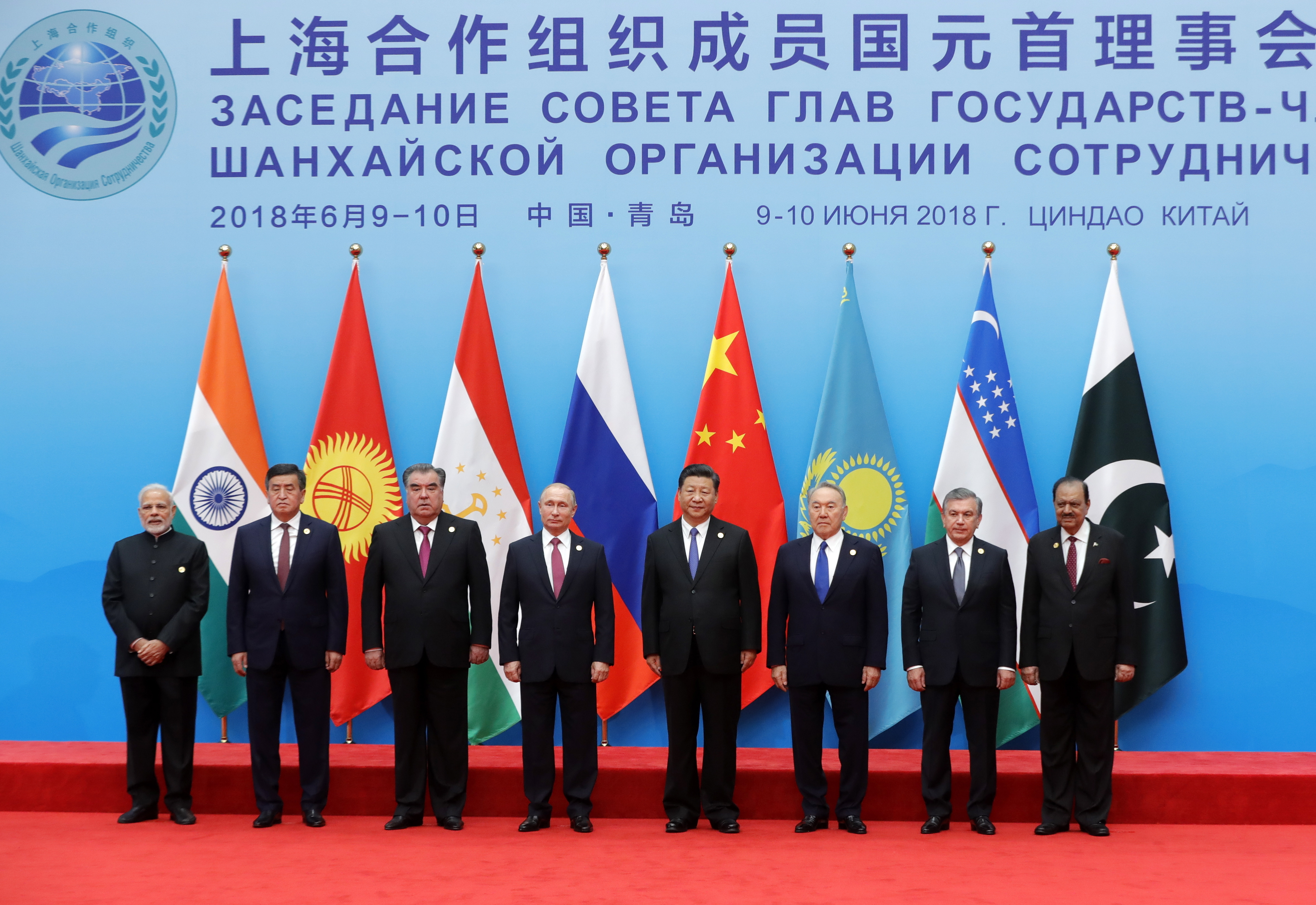 Участники саммита Шанхайской организации сотрудничества